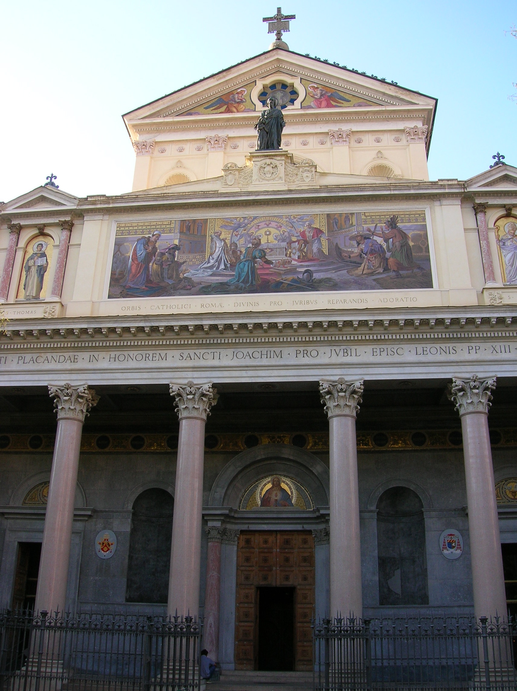 Eglise San Giacchino in Prati in Rome